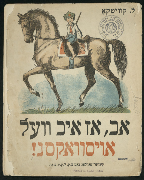 ייִדיש: אכ, אז איכ וועל אויסוואקסנ!, ל. קװיטקא